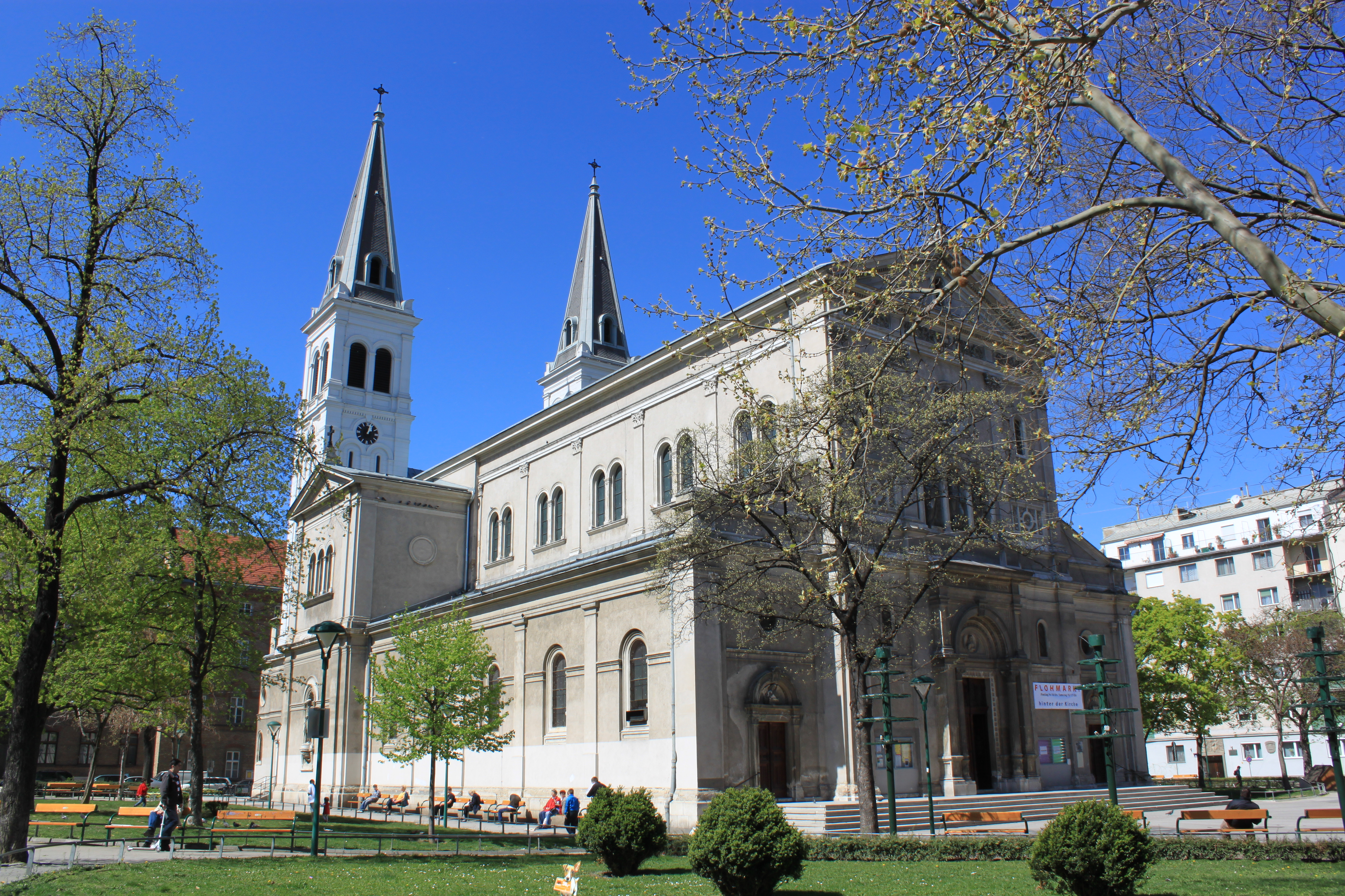 Pfarrkirche St. Johann Evangelist, Wien-Favoriten